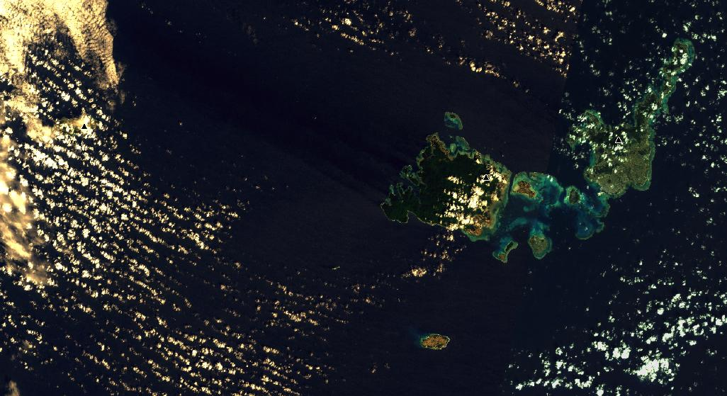 Yaeyama islands in Okinawa, Japan